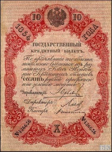 10 рублей 1854 года. Аверс.